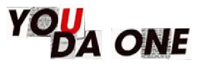 Logo de la chanson You Da One (2011).